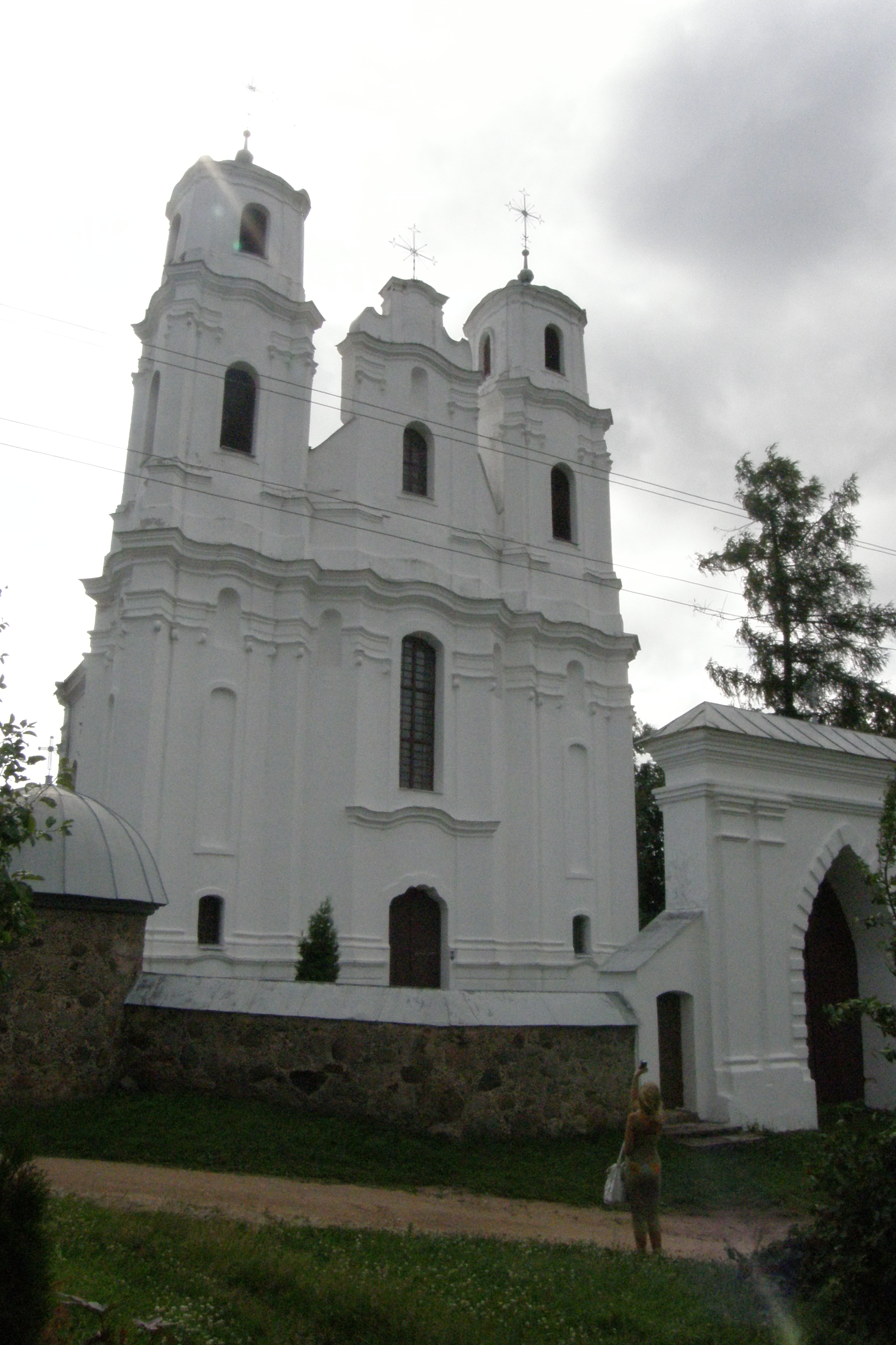 Piedruja church